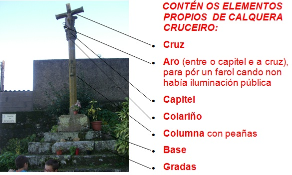 Imaxe do cruceiro da costa coa descrición das partes.